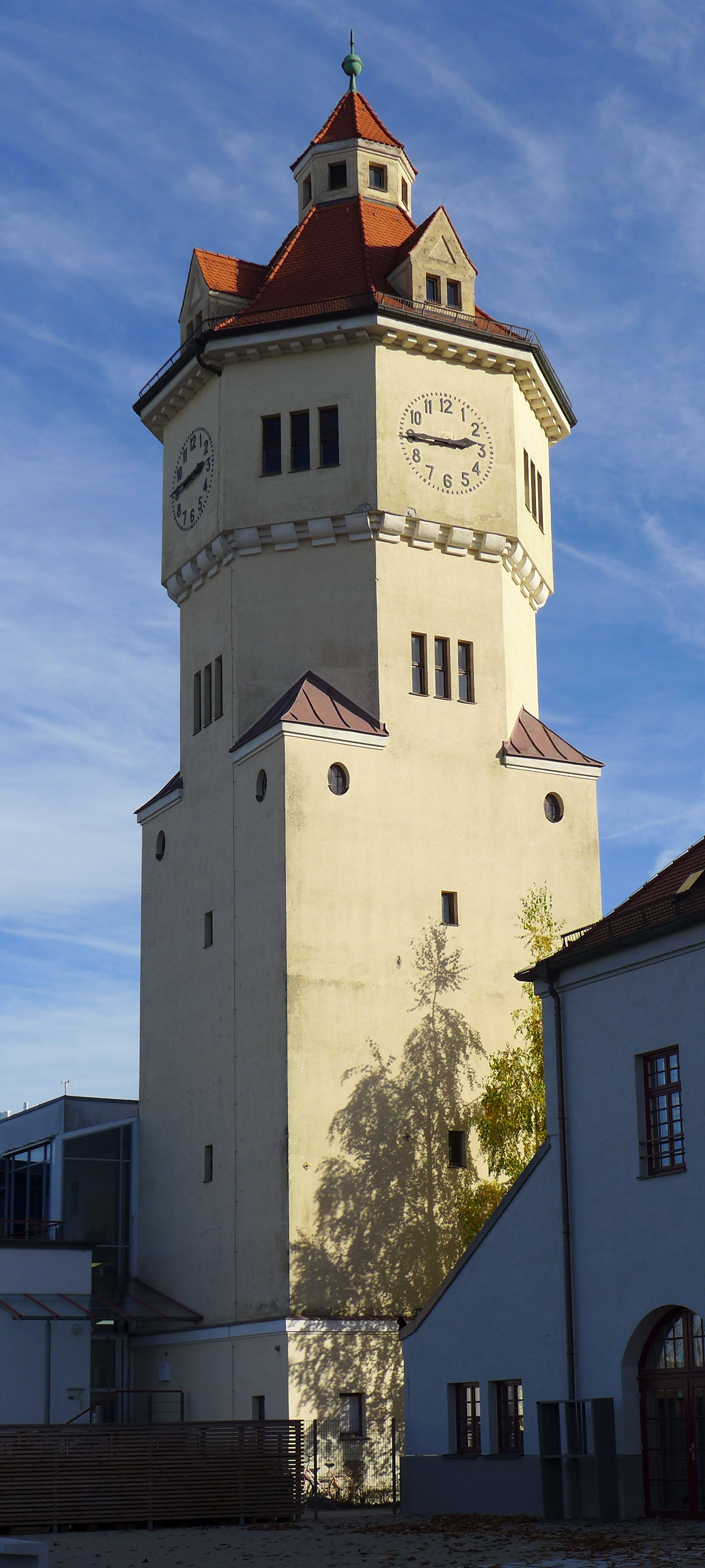 Emmy-Noether-Str Wasserturm, München